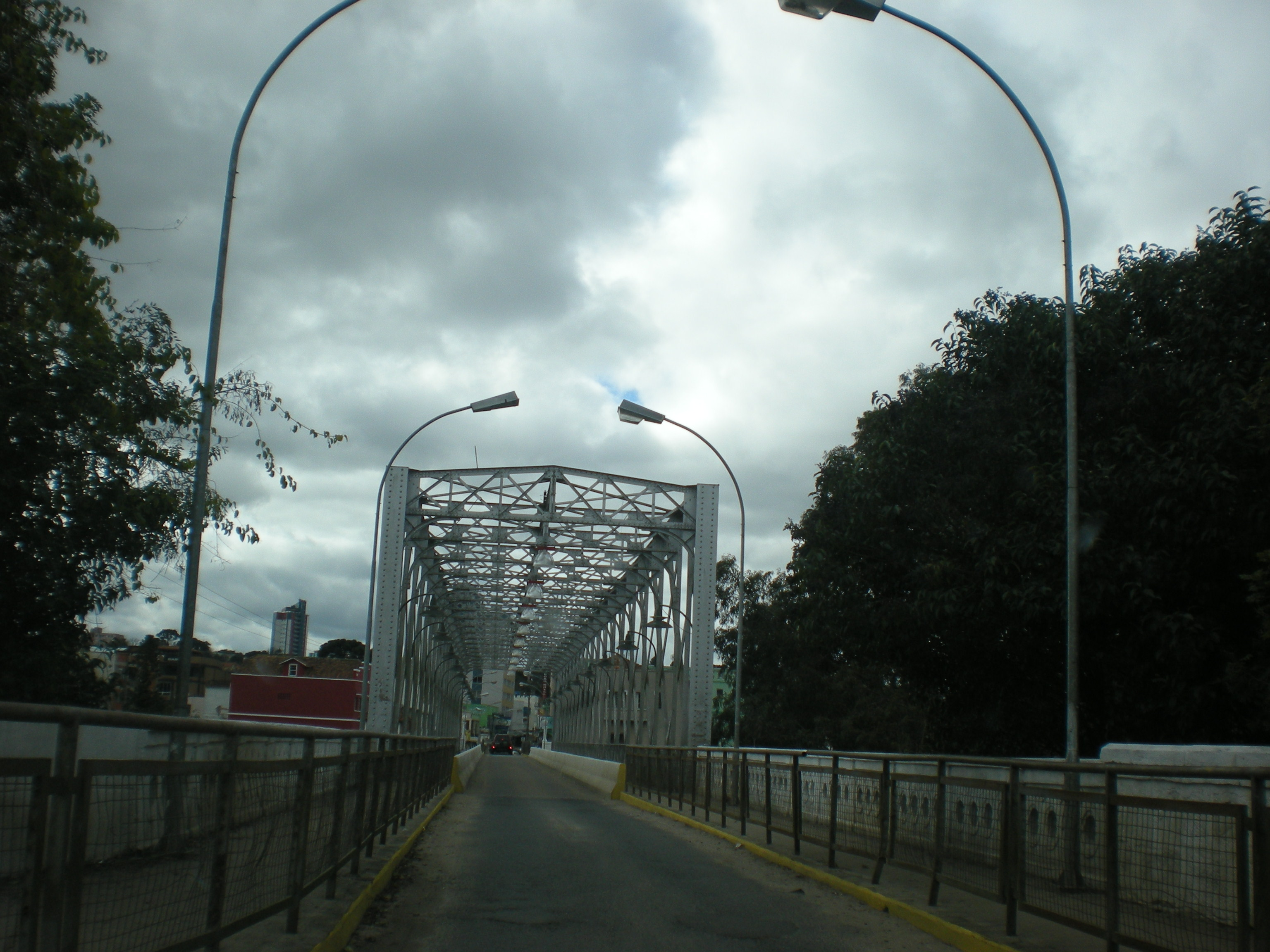 Ponte Metálica entre Rio Negro (Paraná) e Mafra (Santa Catarina)